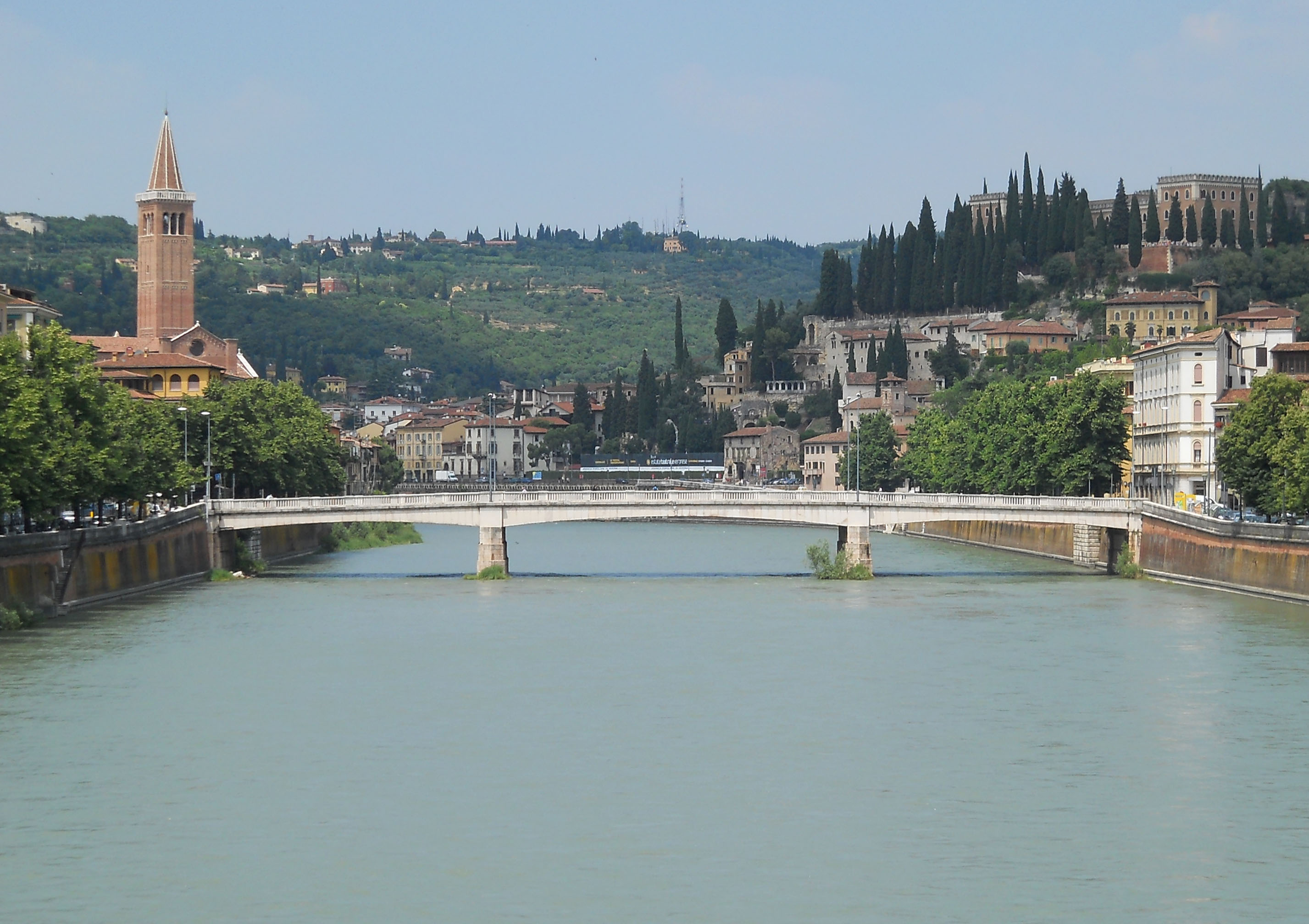 Ponte Nuovo a Verona. A sinistra si scorge la chiesa parrocchiale di Sant'Anastasia .